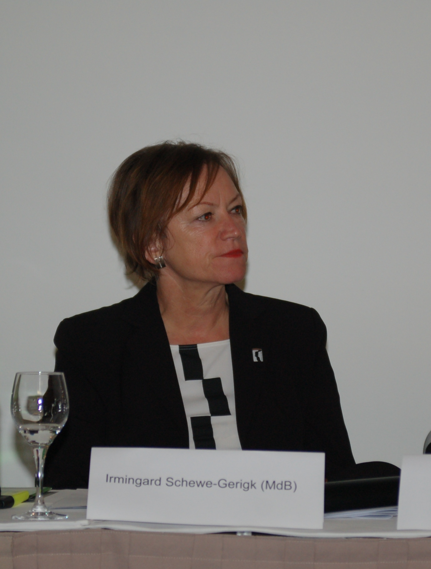 Irmingard Schewe-Gerigk beim Vortrag "Für eine umfassende Reform der Alterssicherung - Lösungsansätze grüner Politik"